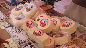 ques de la region de cajamarca peru